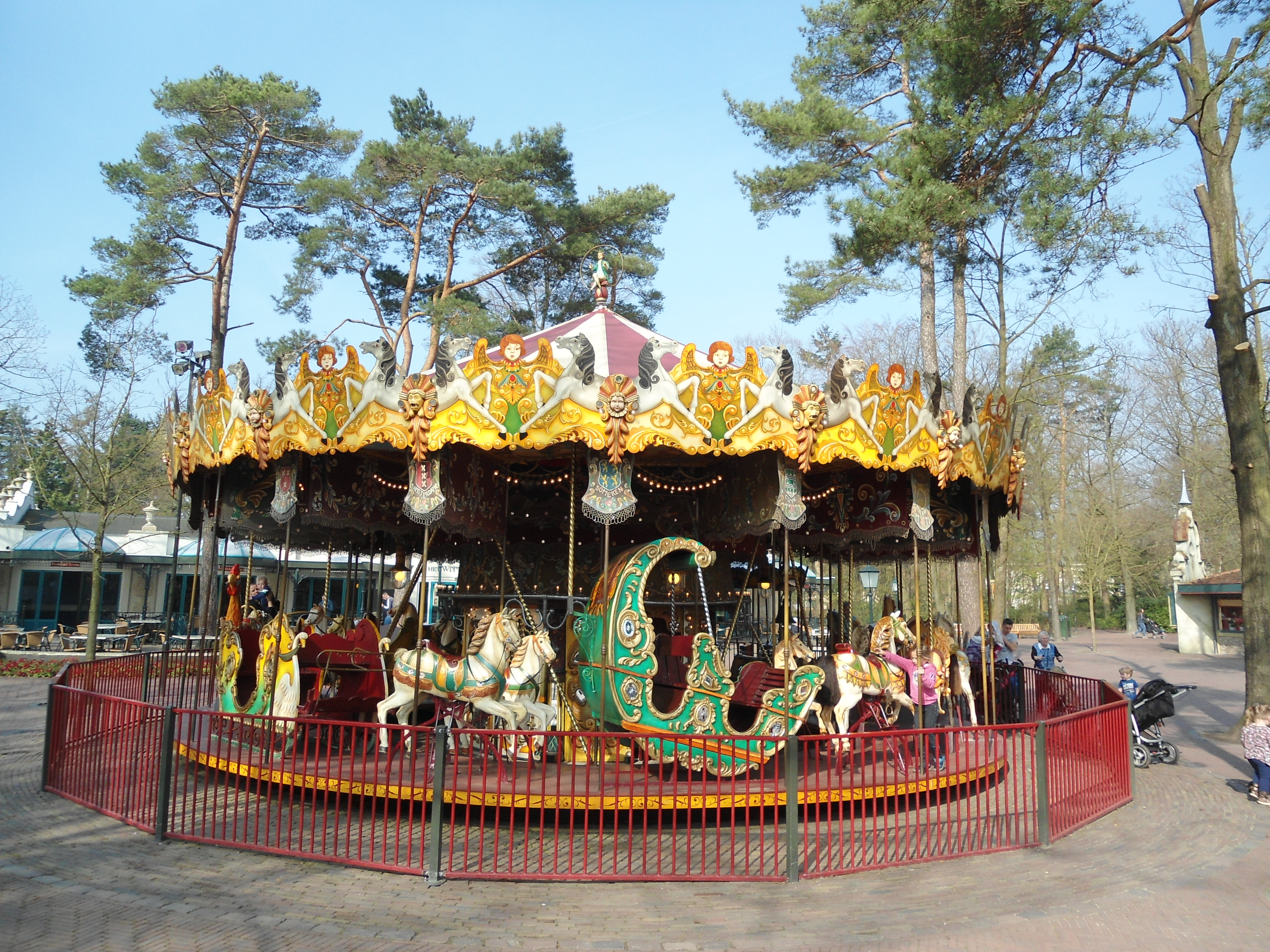 De Vermolen Molen op het Anton Pieckplein